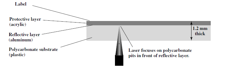 CD-ROM